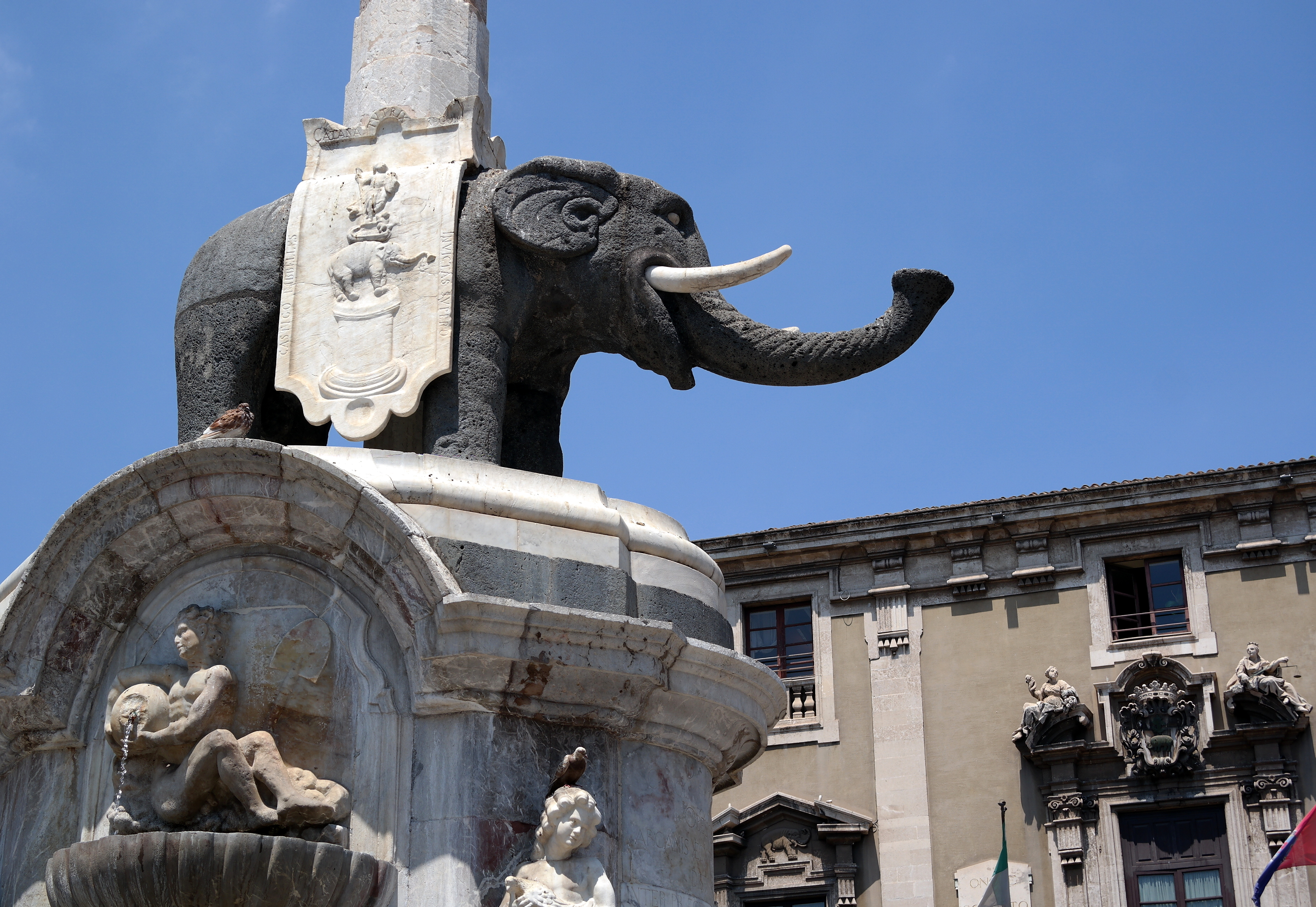 dettaglio della Fontana dell'Elefante, in Piazza del Duomo a Catania